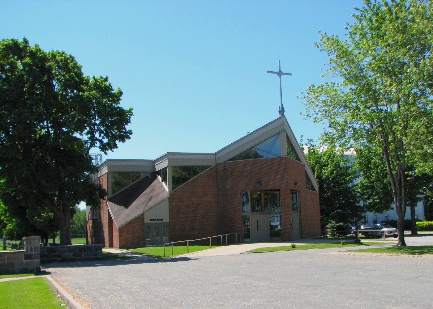 L'église de Deschaillons-sur-Saint-Laurent Il s'agit de la quatrième église. La première messe a été célébrée le 12 juillet 1986.